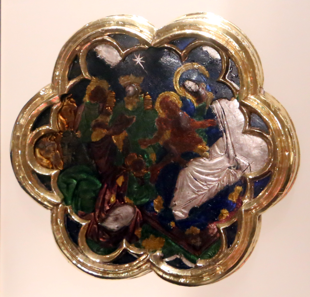 Piazza Santa Maria Maggiore This is a photo of a monument which is part of cultural heritage of Italy.